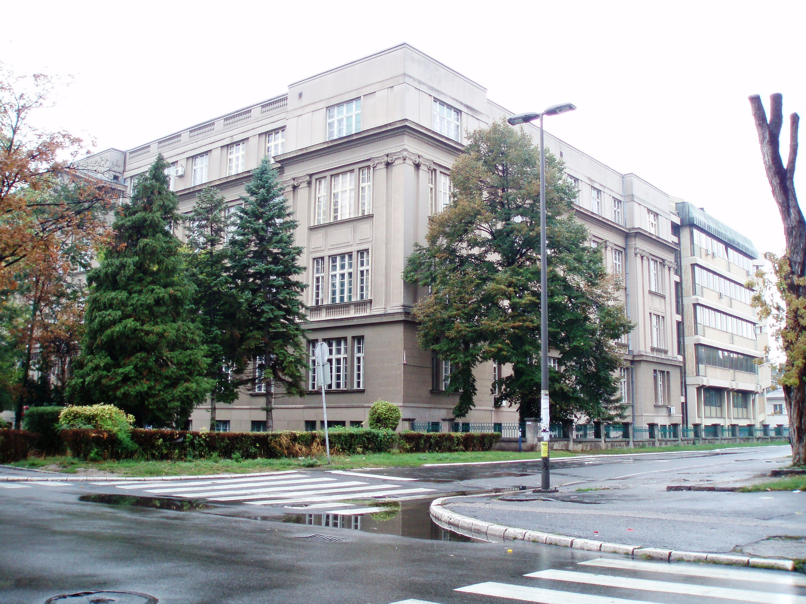 Fotografija Poljoprivrednog fakulteta u Zemunu, Autor:Nicolo